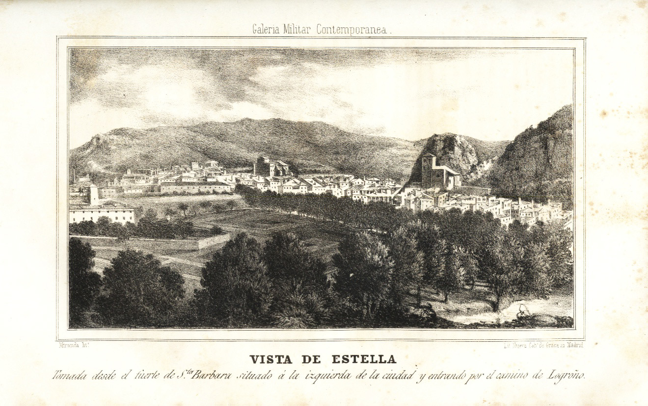 Vista de Estella, en Navarra (España). "Galería Militar Contemporánea". Madrid 1846